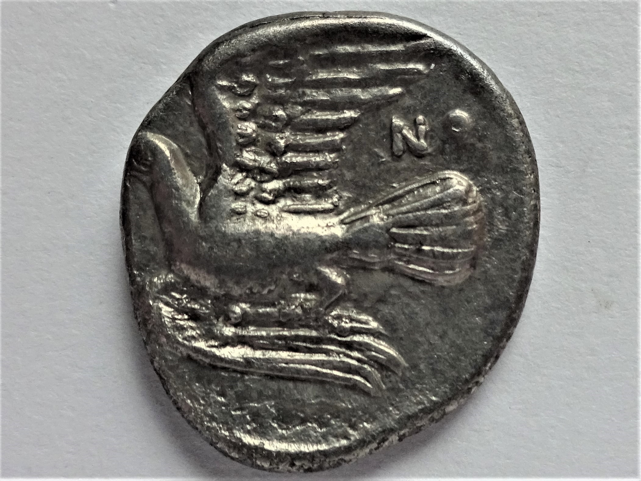 Rückseite der Hemidrachme mit Taube, Szaivert/Sear Nr. 2872 Rv